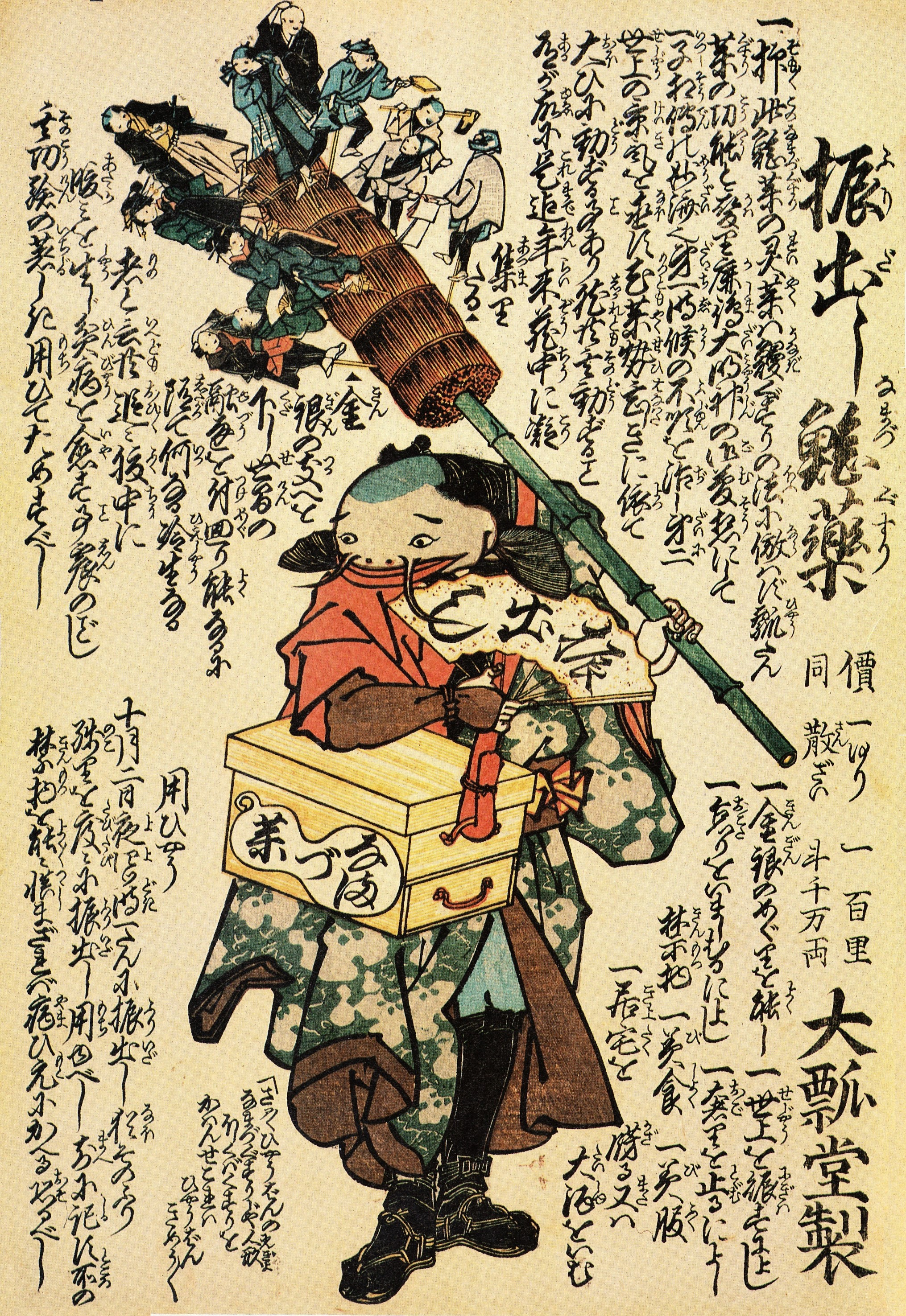 Namazu-e